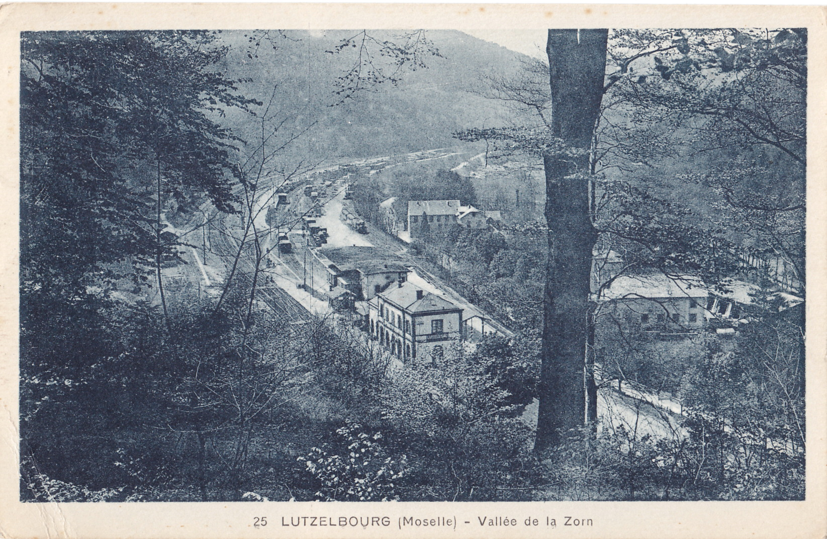 Carte postale ancienne éditée par